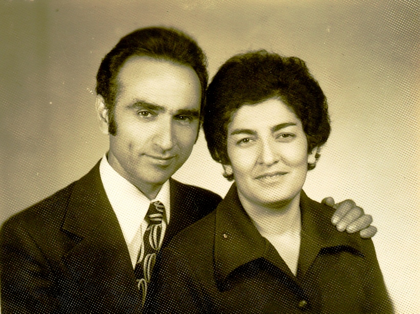 Վալենտին Թովմասյանը տիկնոջ` Նելլի Մուրադյանի հետ 1977թ.